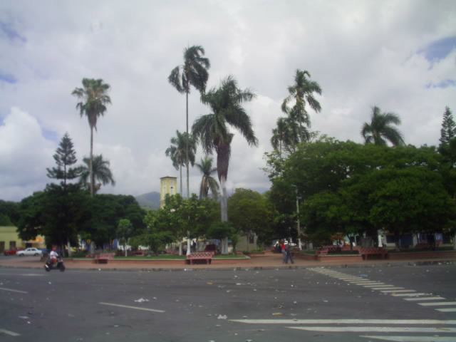 Parque Principal